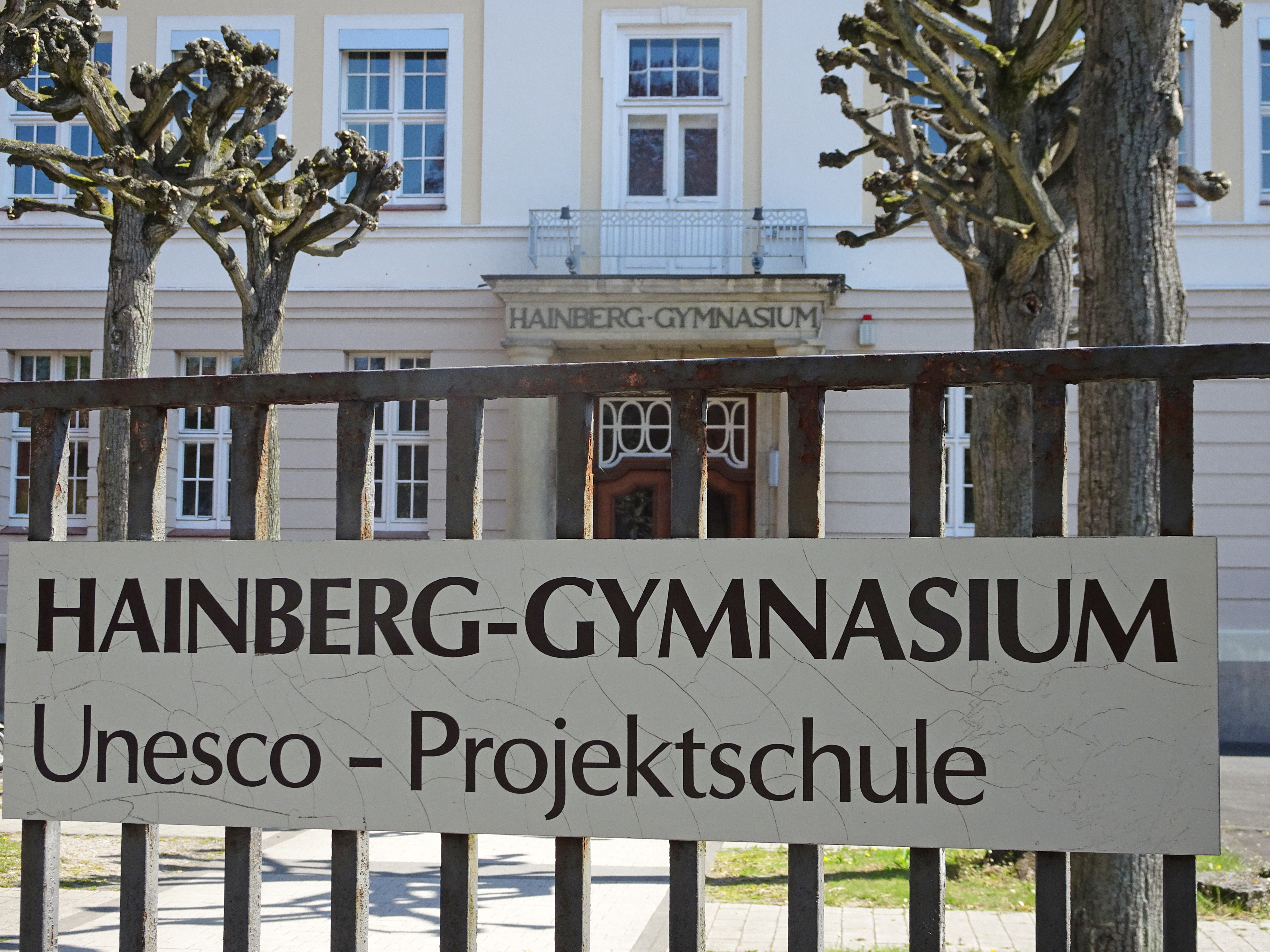 Hainberg-Gymnasium Göttingen ist eine Unesco-Projektschule